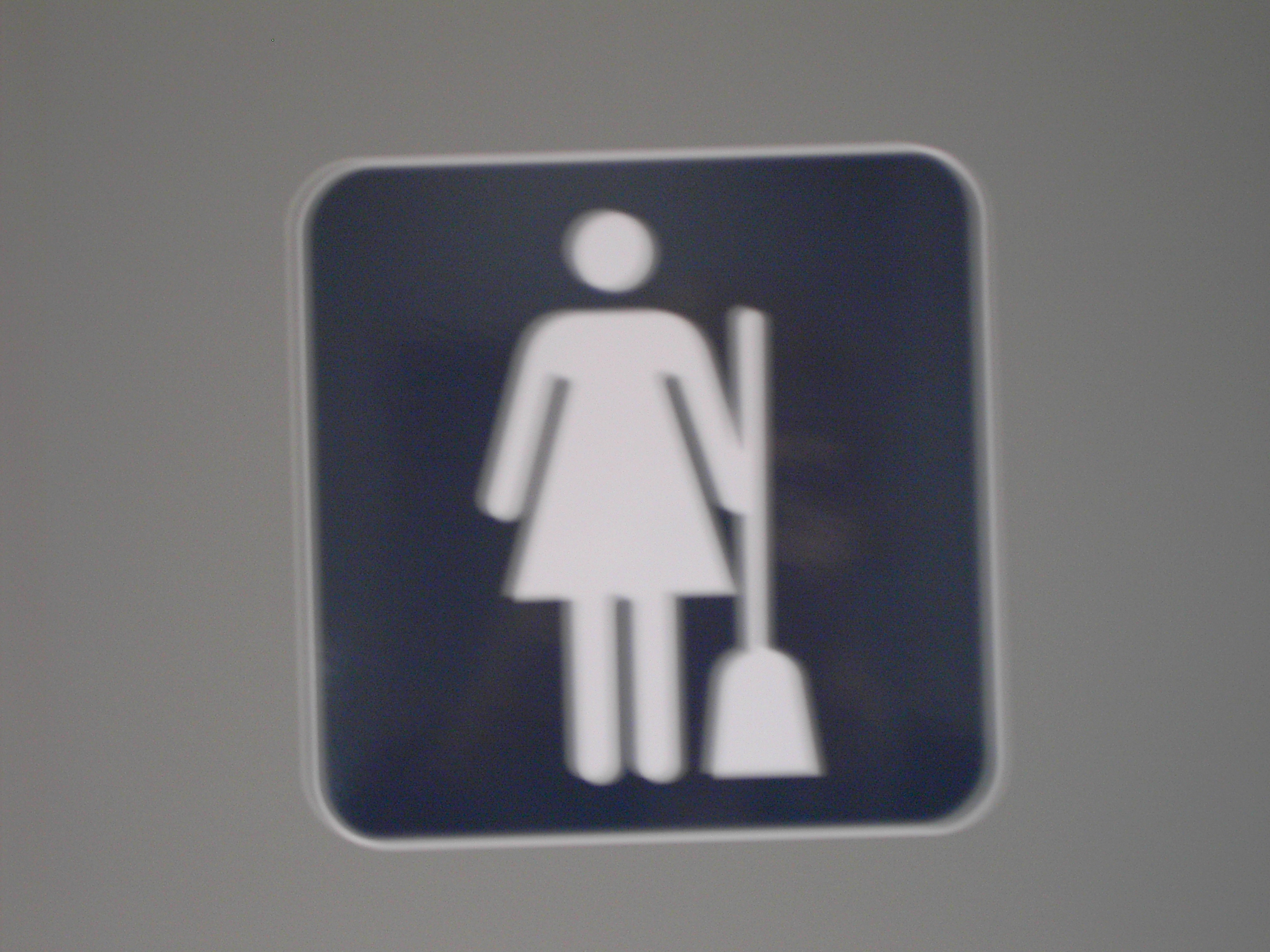 photo personnelle faite dans un aeroport parisien. J'ignore sous quelle license je dois la mettre.